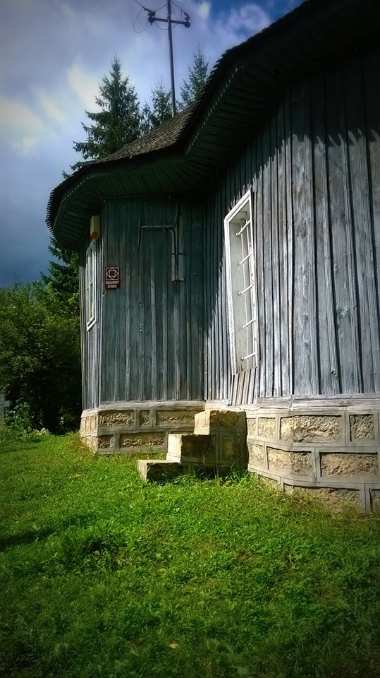 Biserica „Sf. Ioan Botezătorul”